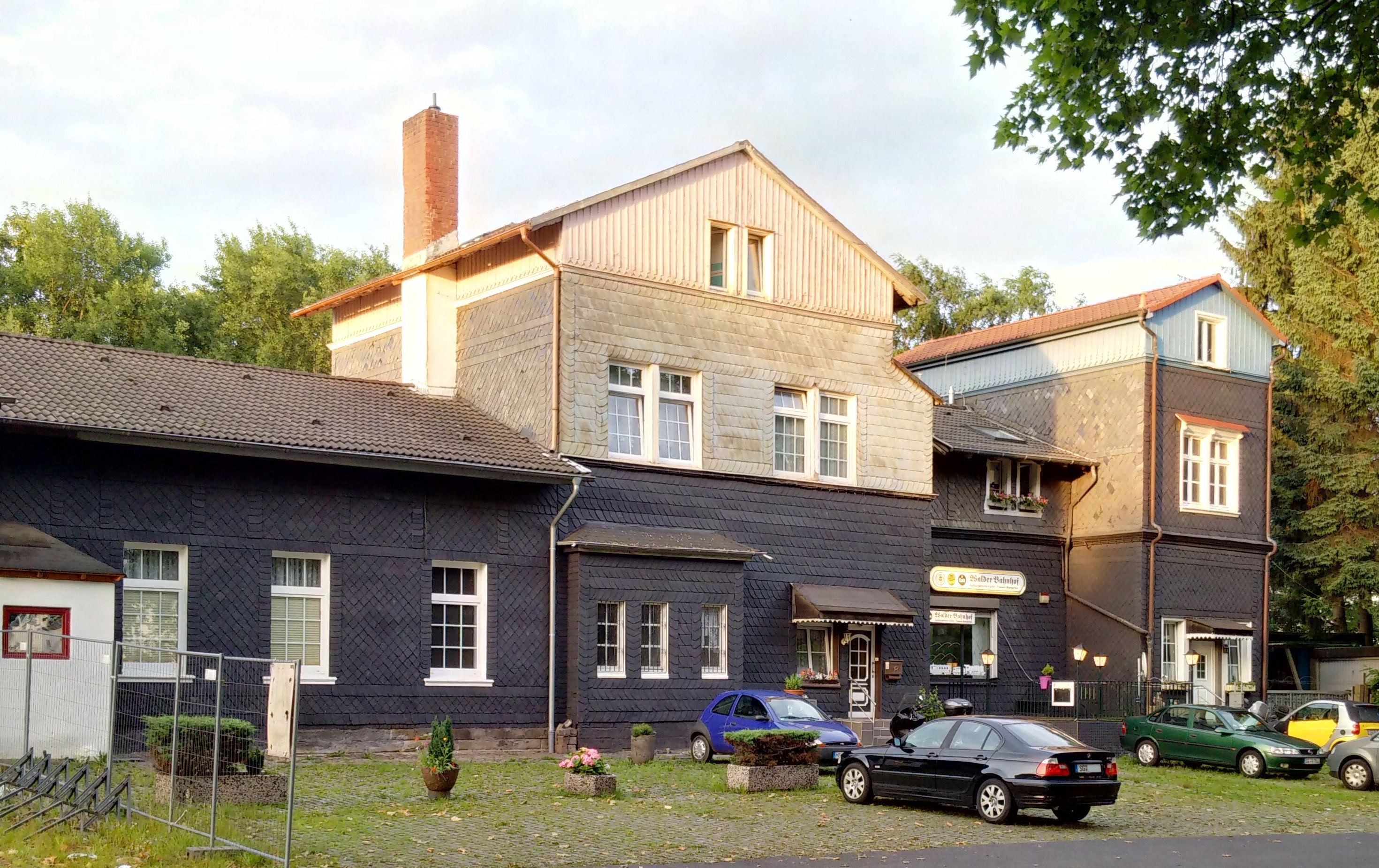 Empfangsgebäude des ehemaligen Walder Bahnhofs, aufgenommen im Sommer 2016